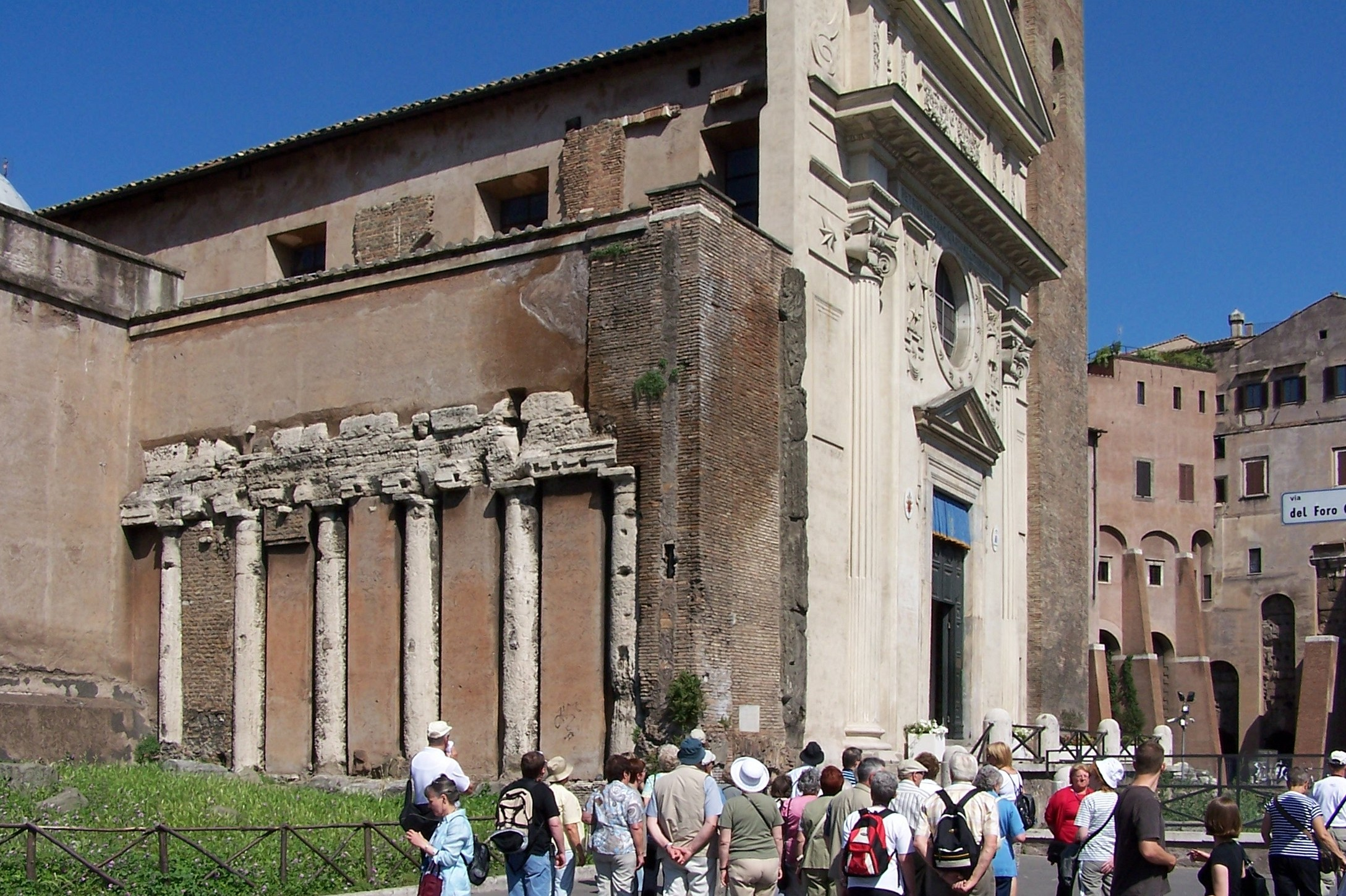 San Nicola in Carcere (Rom) mit altrömischen Relikten